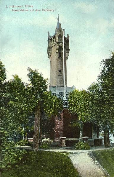 Murowana wieża widokowa na Wzgórzu Pachołek w Gdańsku-Oliwie, wysadzona w powietrze przez wycofujących się Niemców w marcu 1945 r.